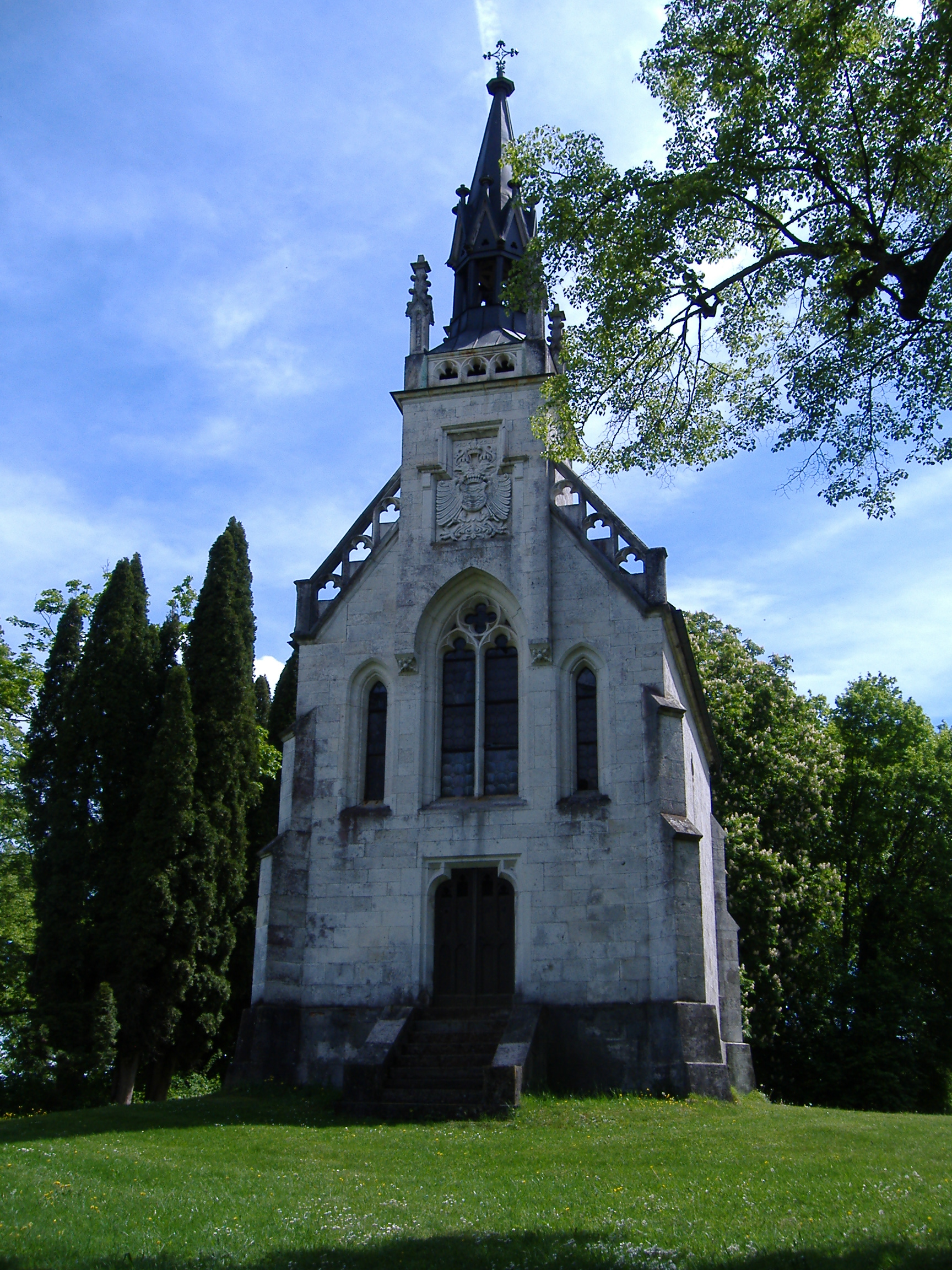 Gruftkapelle der bayerischen Kurfürstin Maria Leopoldine